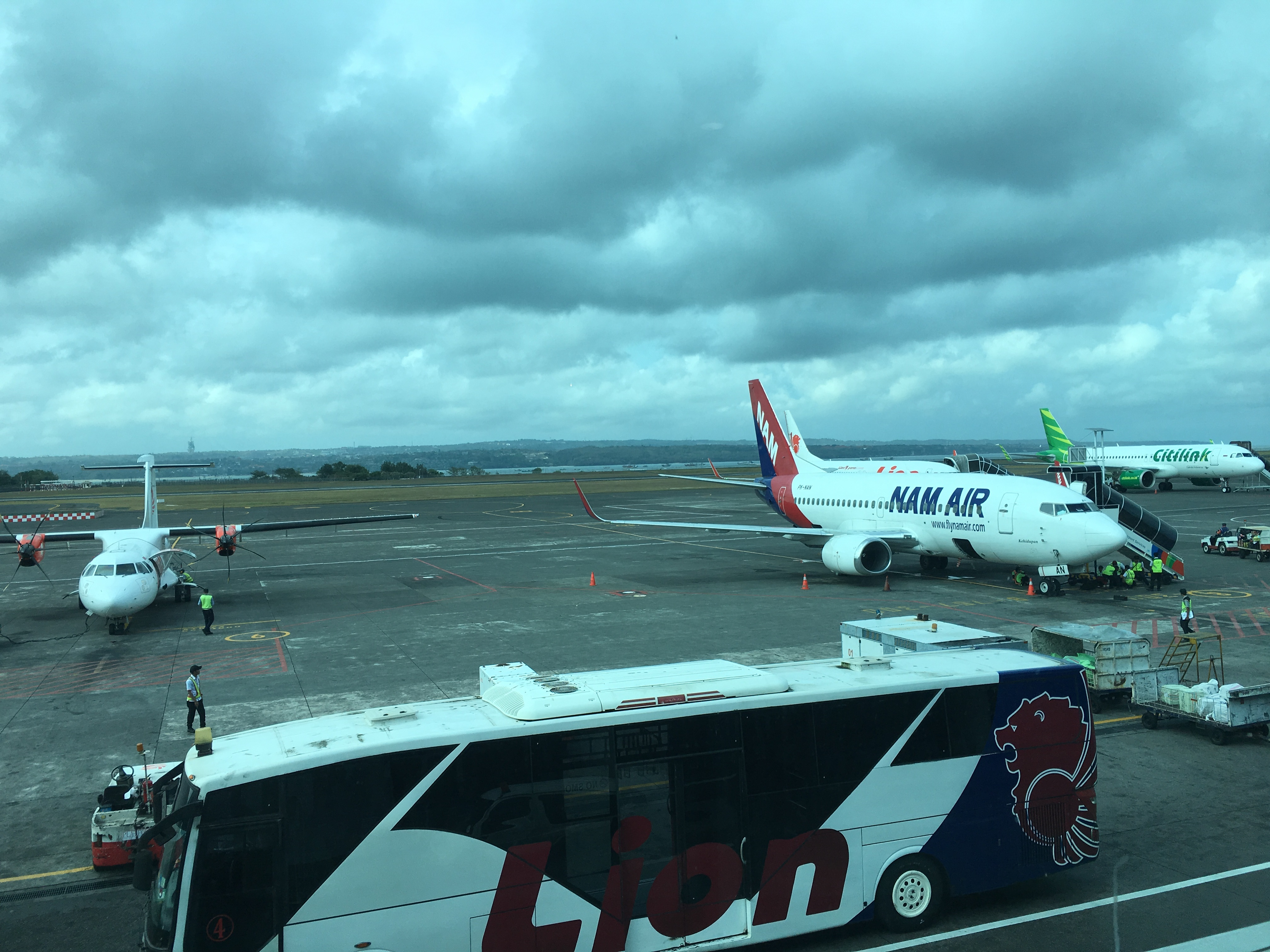 Boeing 737-500 di Bandara Ngurah Rai Bali (DPS) bersama ATR 72 Wings Abadi dan Airbus320 Citilink